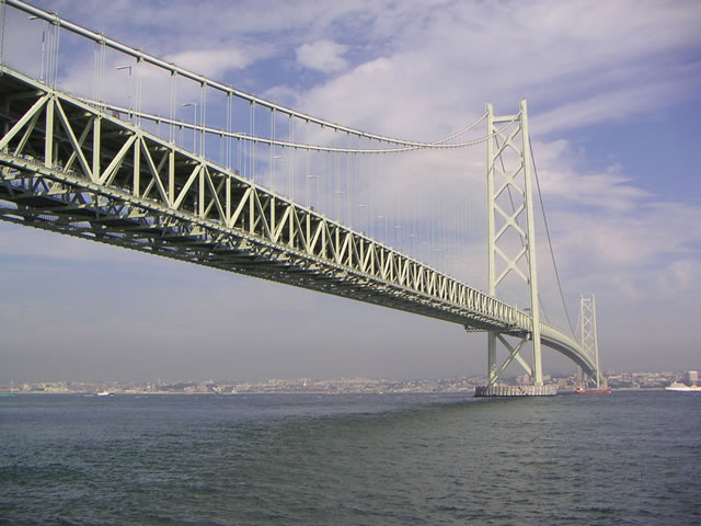 Akashi-Kaikyo-Brücke von der Insel Awaji aus Ort: Awaji Island